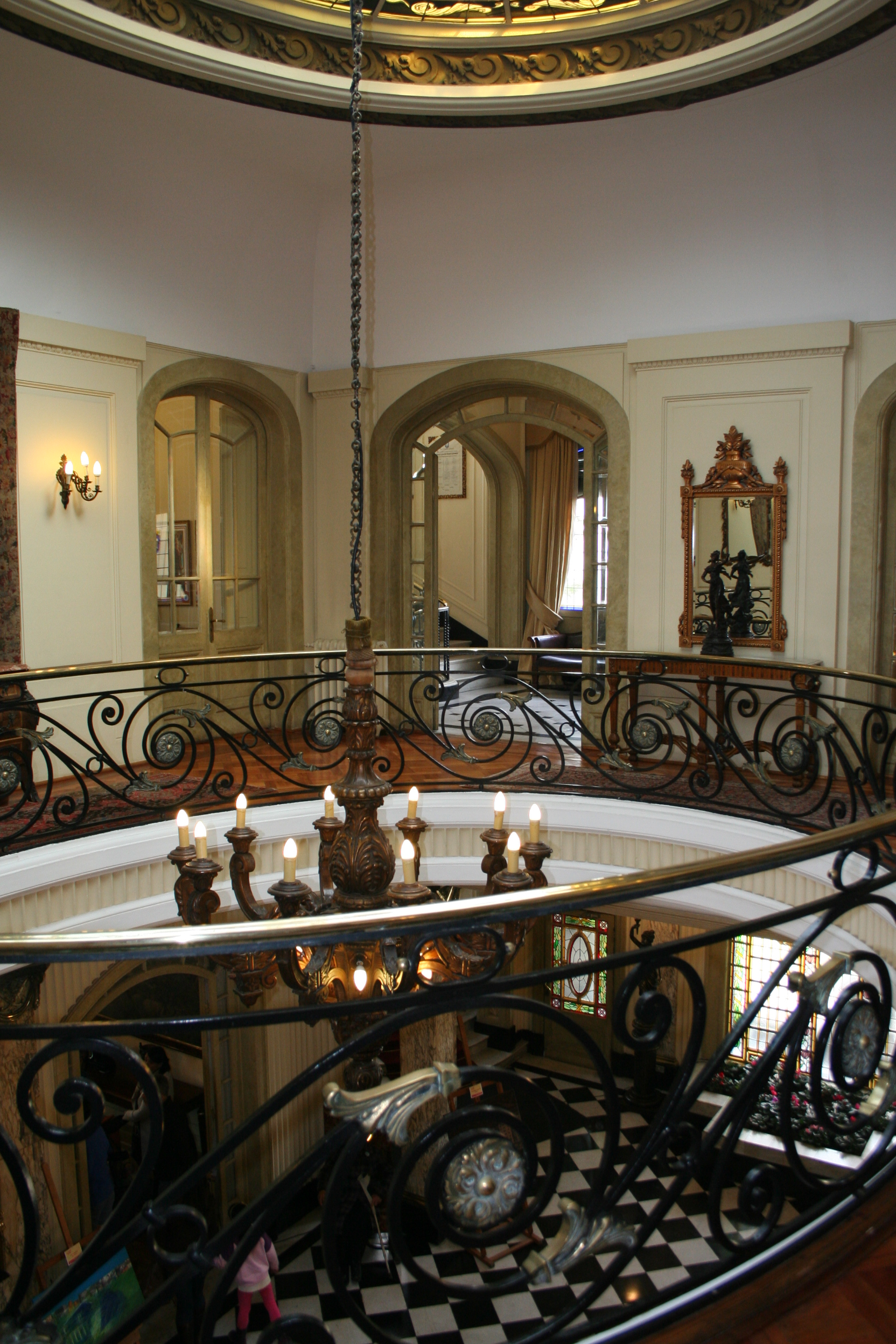 Pasillo que da a las habitaciones segundo piso